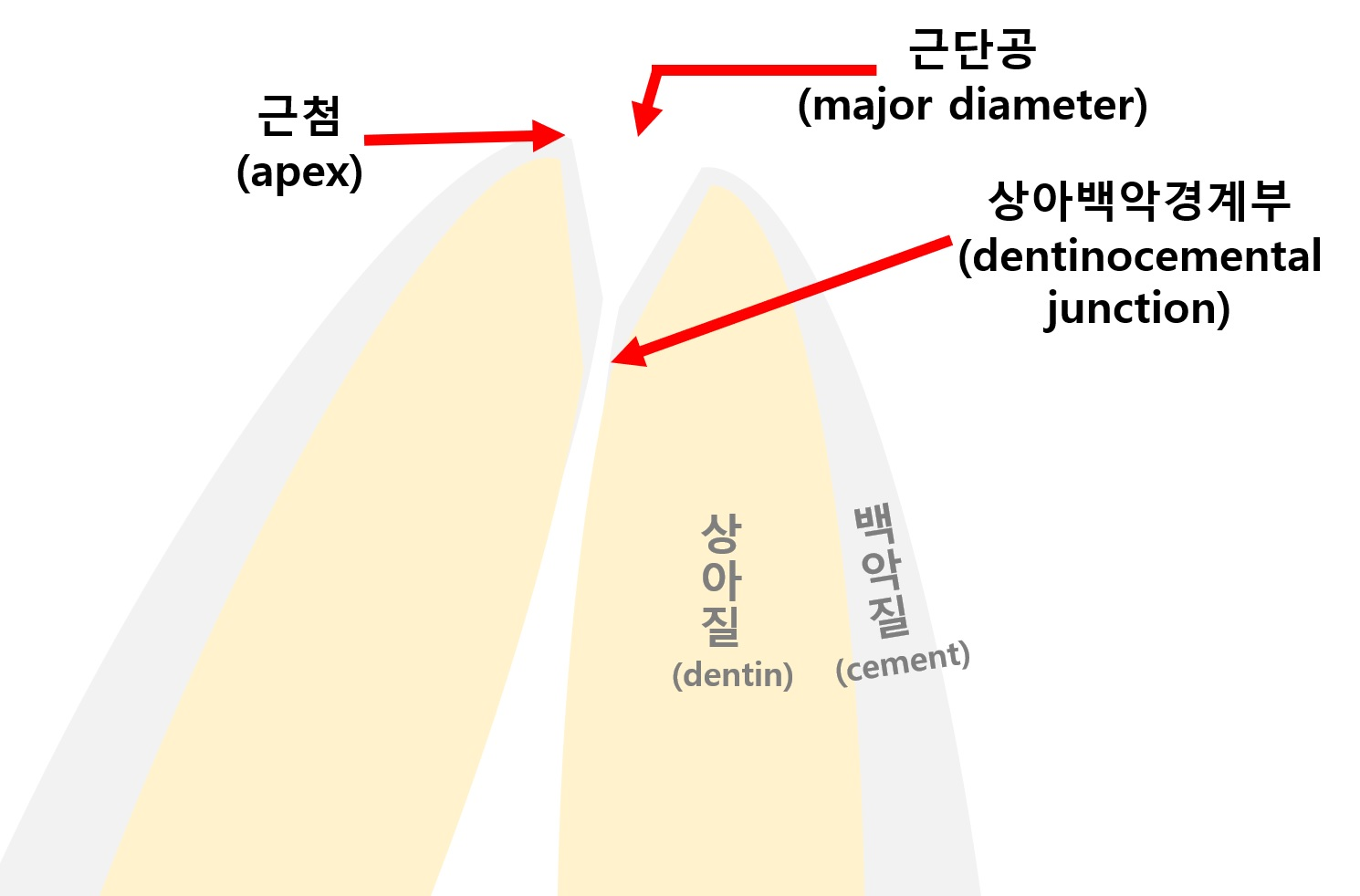 근첨의 구조를 이해하기 쉽게 그림으로 자체제작 했음